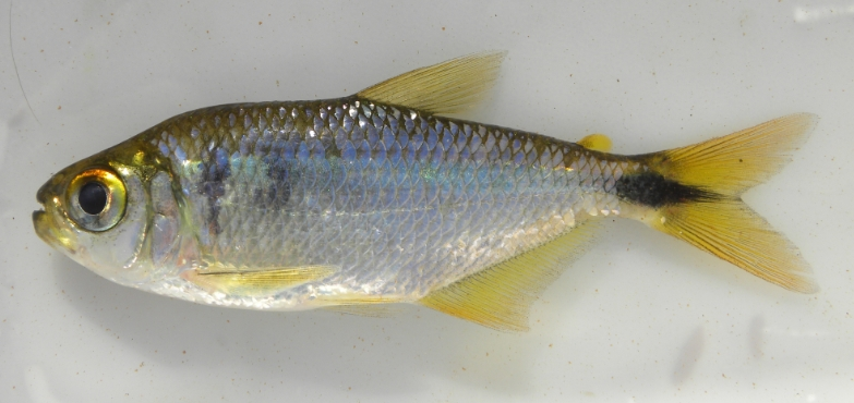 Astyanax saguazu